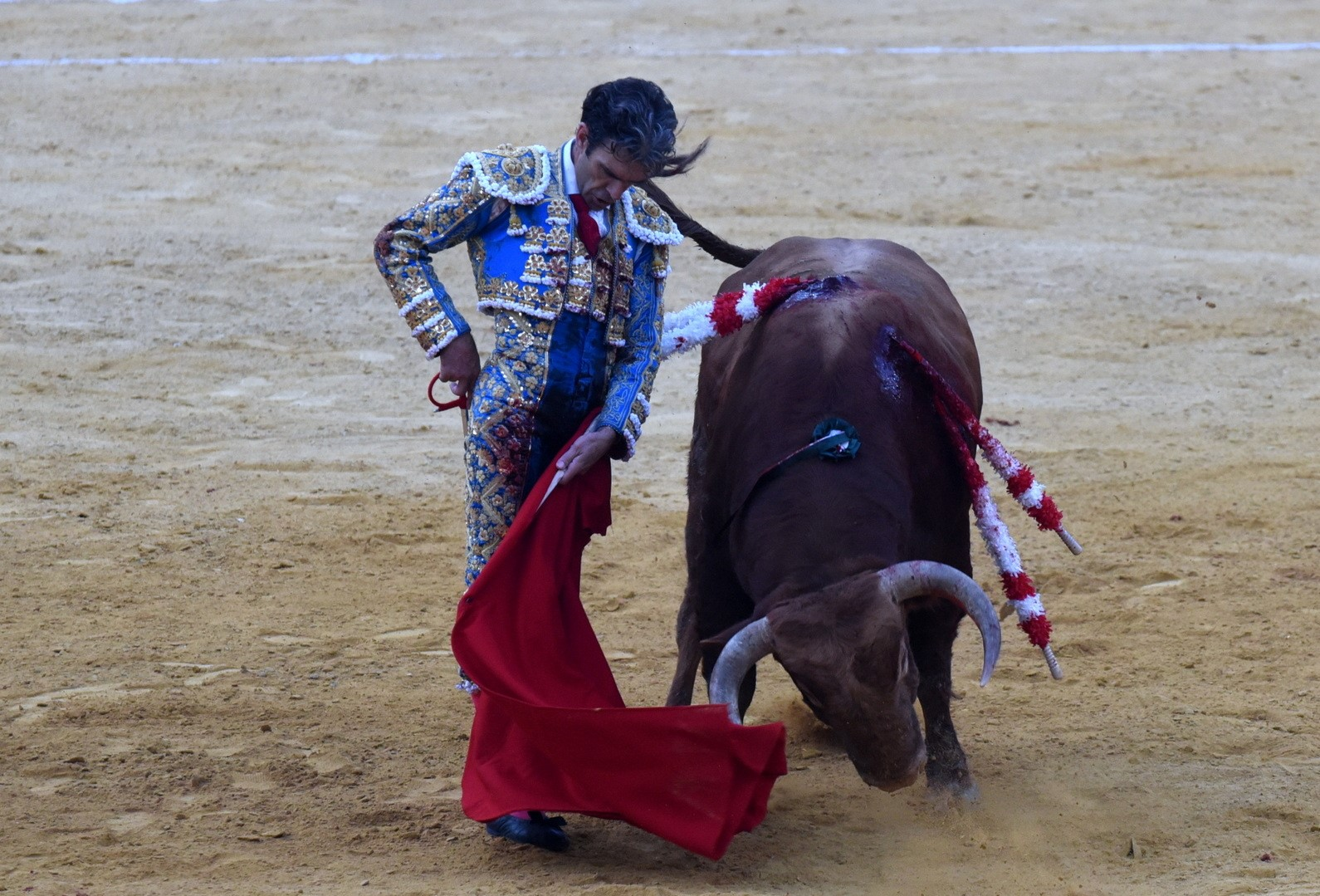 Trincherilla como remate de serie de naturales, y, por su trayectoria, citado con toda la ventaja para el toro.